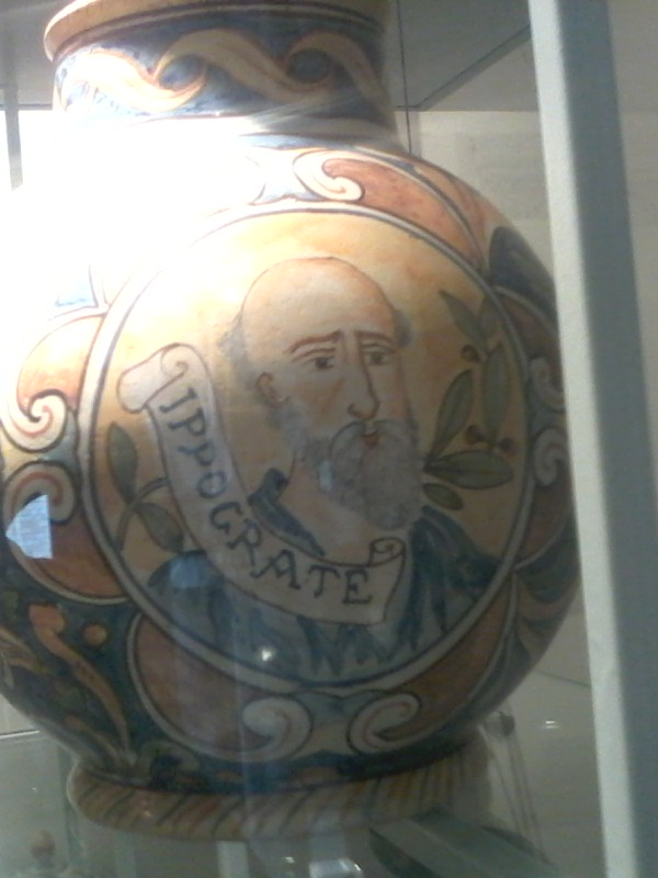 vaza u Kneževu dvoru, Dubrovnik